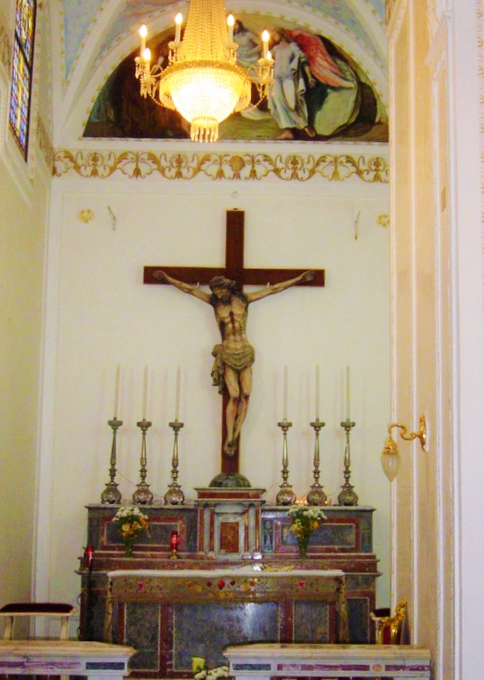 Parrocchia Maria Ss. delle Grazie - navata sinistra